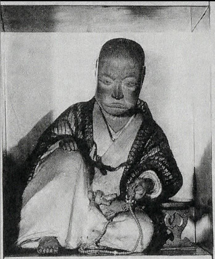 土浦藩主・松平信興と伝わる木像。